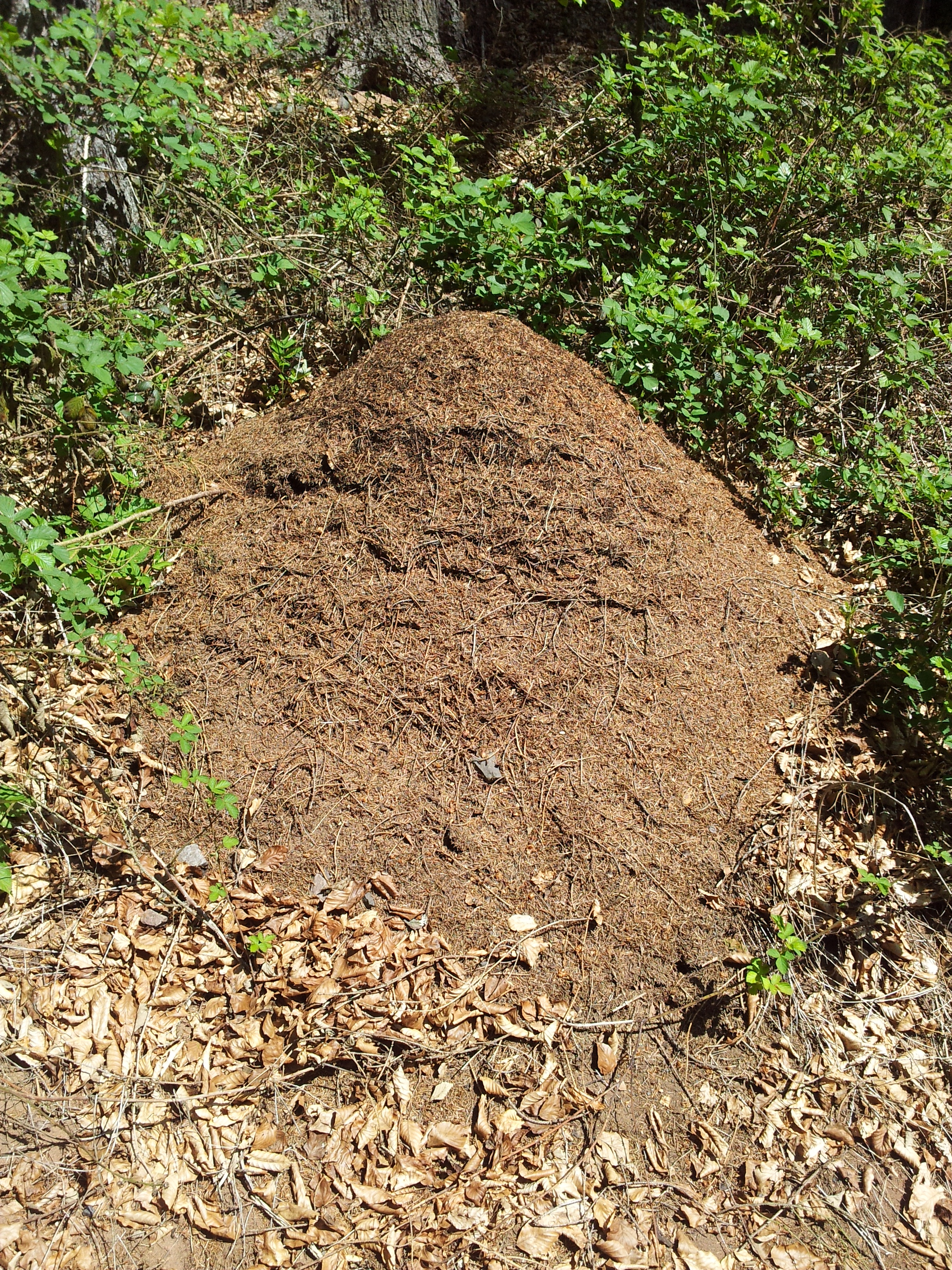 Ameisenhügel der Roten Waldameise im Pfälzer Wald.